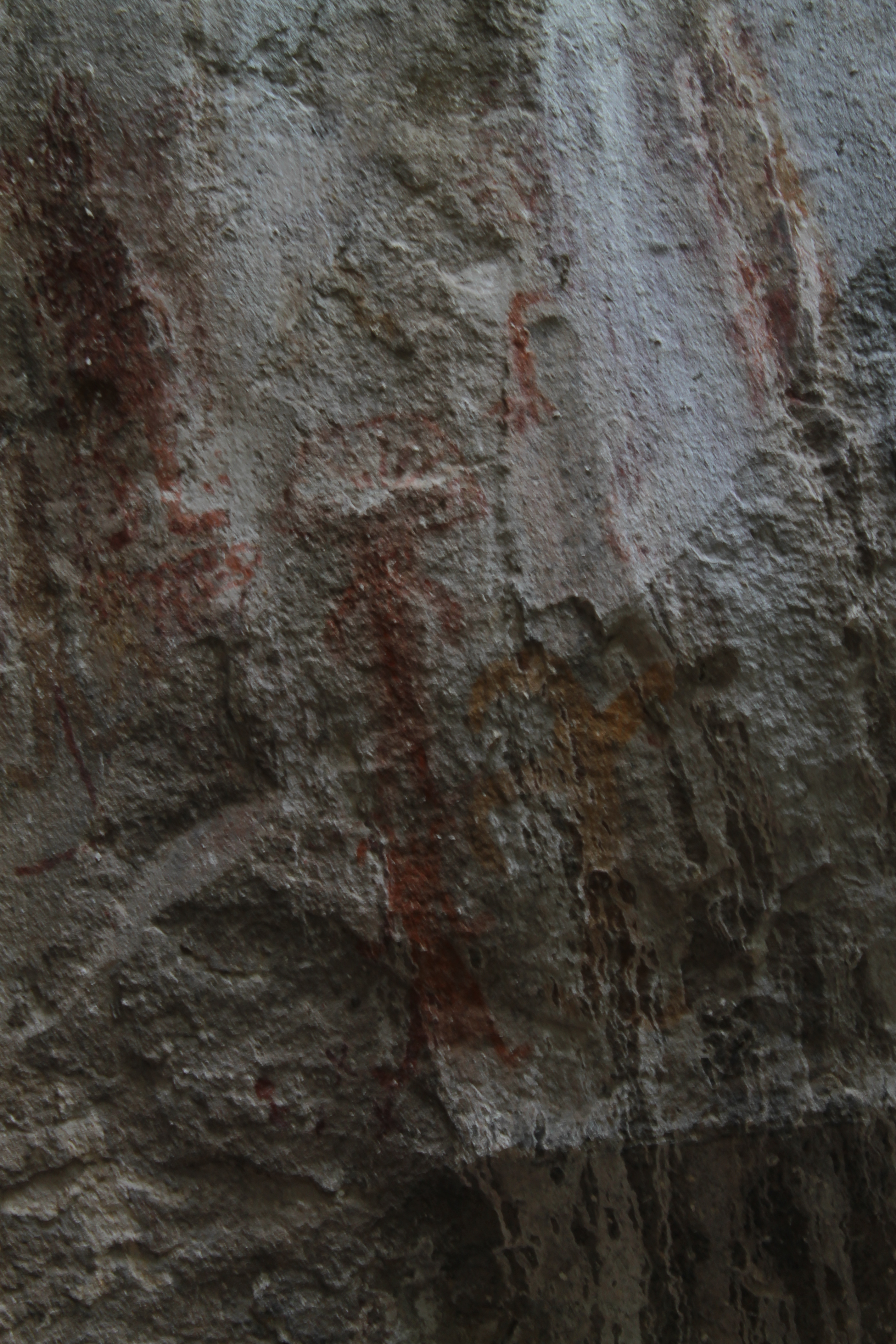 Pinturas rupestres Conrinto Morazan El Salvador, Cueva el Espiritu Santo